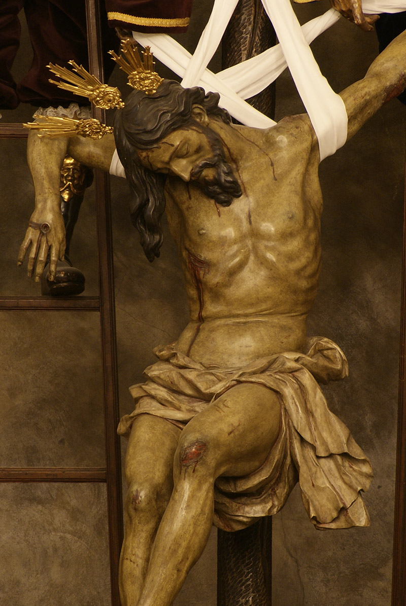 Fotografia realizada por Manuel Francisco Álvarez Ruiz.